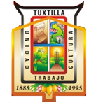 Escudo de Tuxtilla